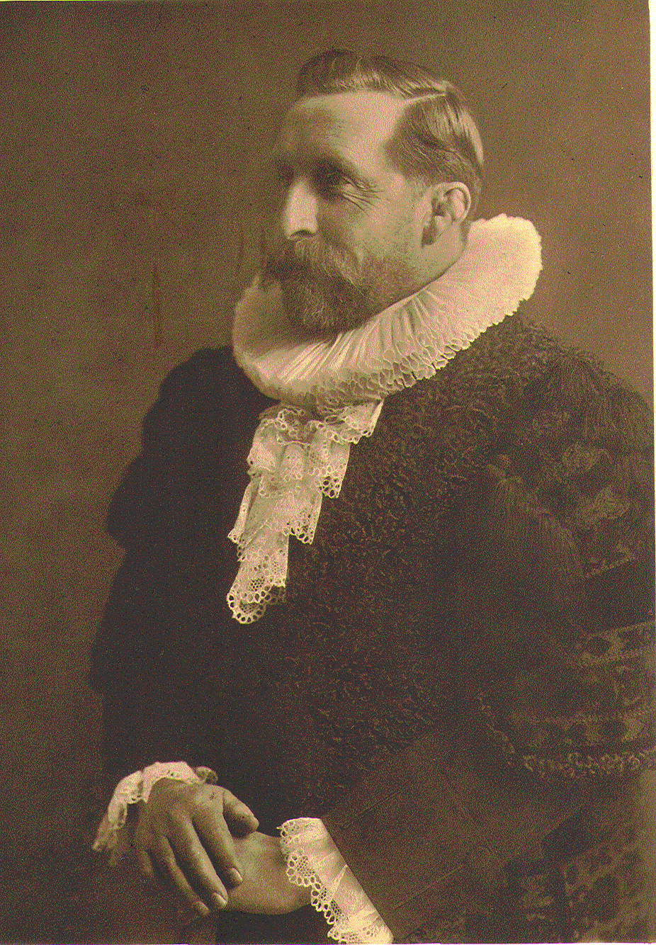 Max Predöhl (1854–1923), Hamburger Bürgermeister